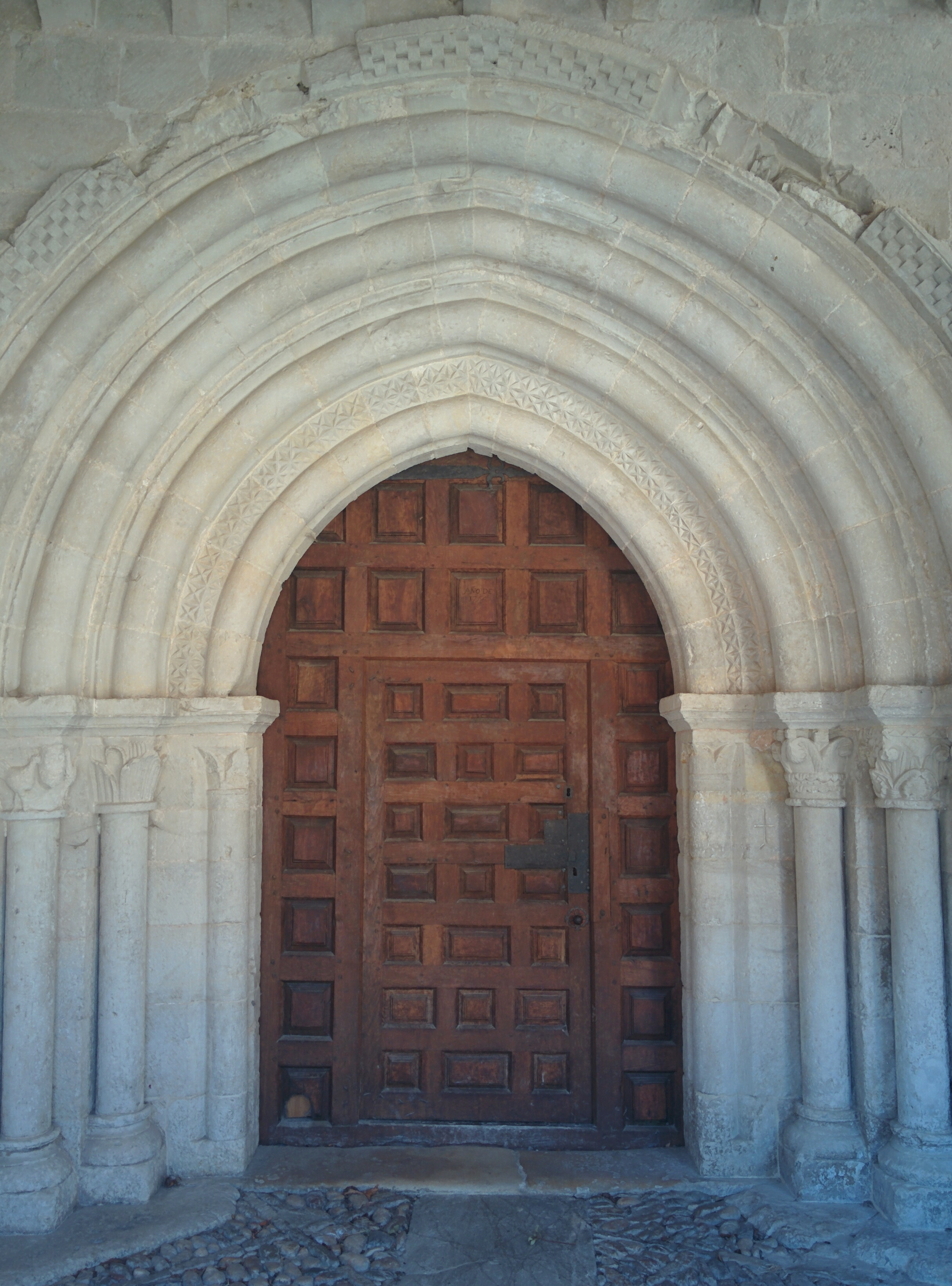 Iglesia de San Saturnino, en San Zadornil (Burgos, España).